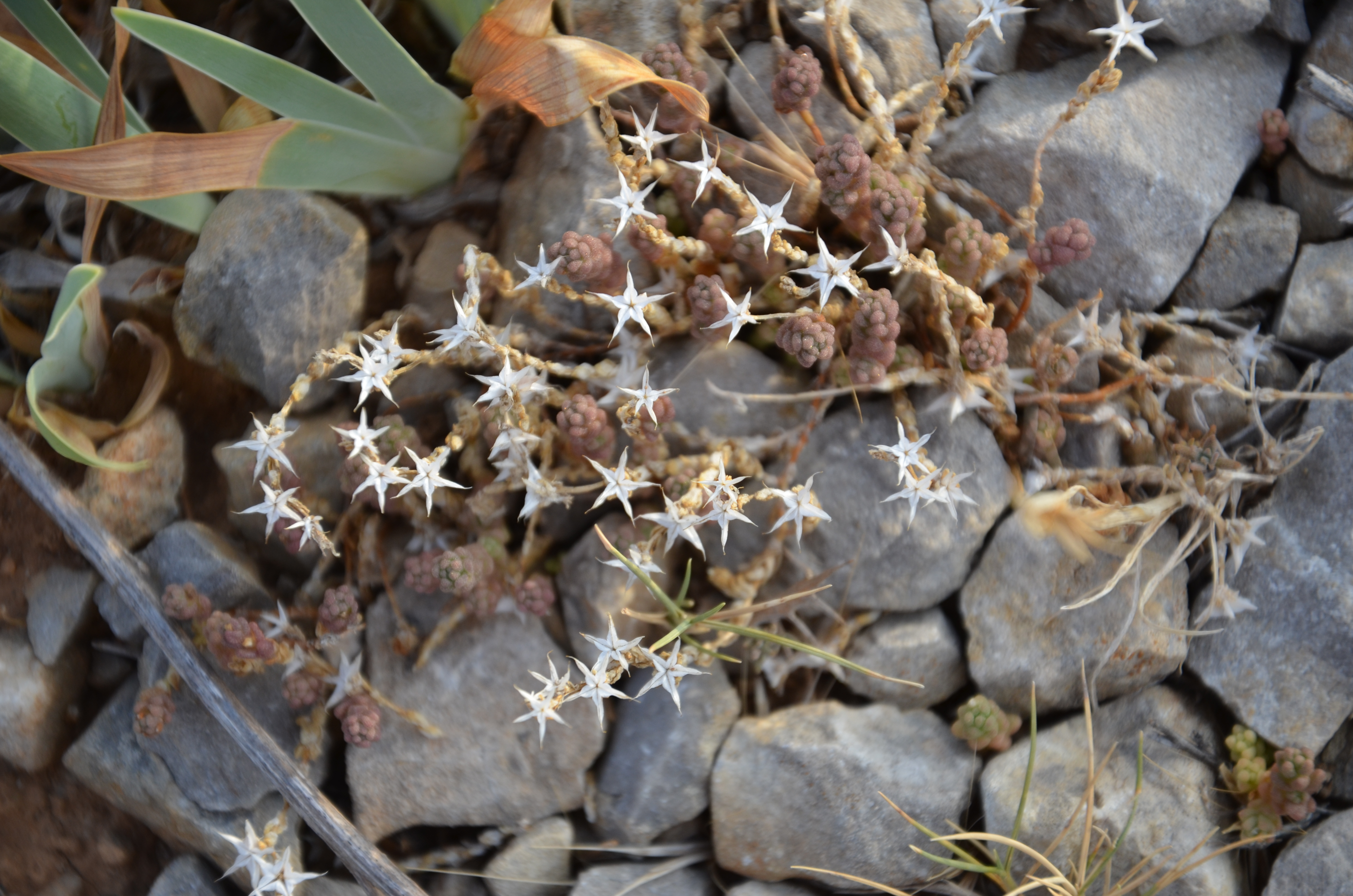 Sedum acre subsp. negletum -Île St Martin, Gruissan -12)